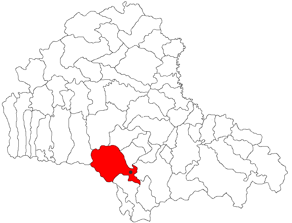 Categorie:Hărţi ale judeţului Braşov